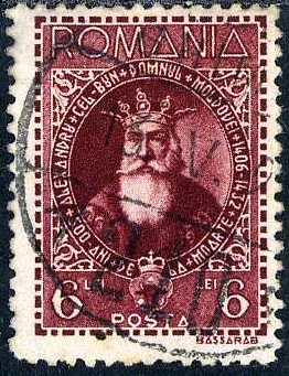 Marcă poştală emisă în 1932 cu ocazia împlinirii a 500 de ani de la moartea domnitorului Alexandru cel Bun. Textul de pe marcă prezintă o greşeală, deoarece anul înscăunării domnitorului este 1400, nu 1406, motiv pentru care din tirajul de 500.000 bucăţi au fost distruse 400.000, rămânând în circulaţie doar 100,000 exemplare.